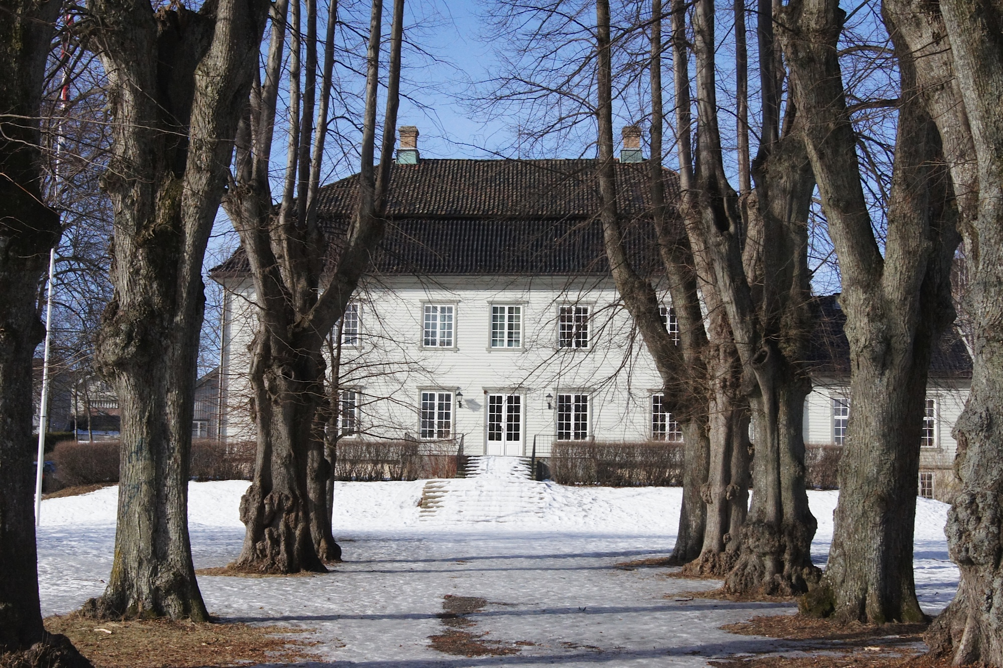 Torderød Gård, Jeløy, Moss